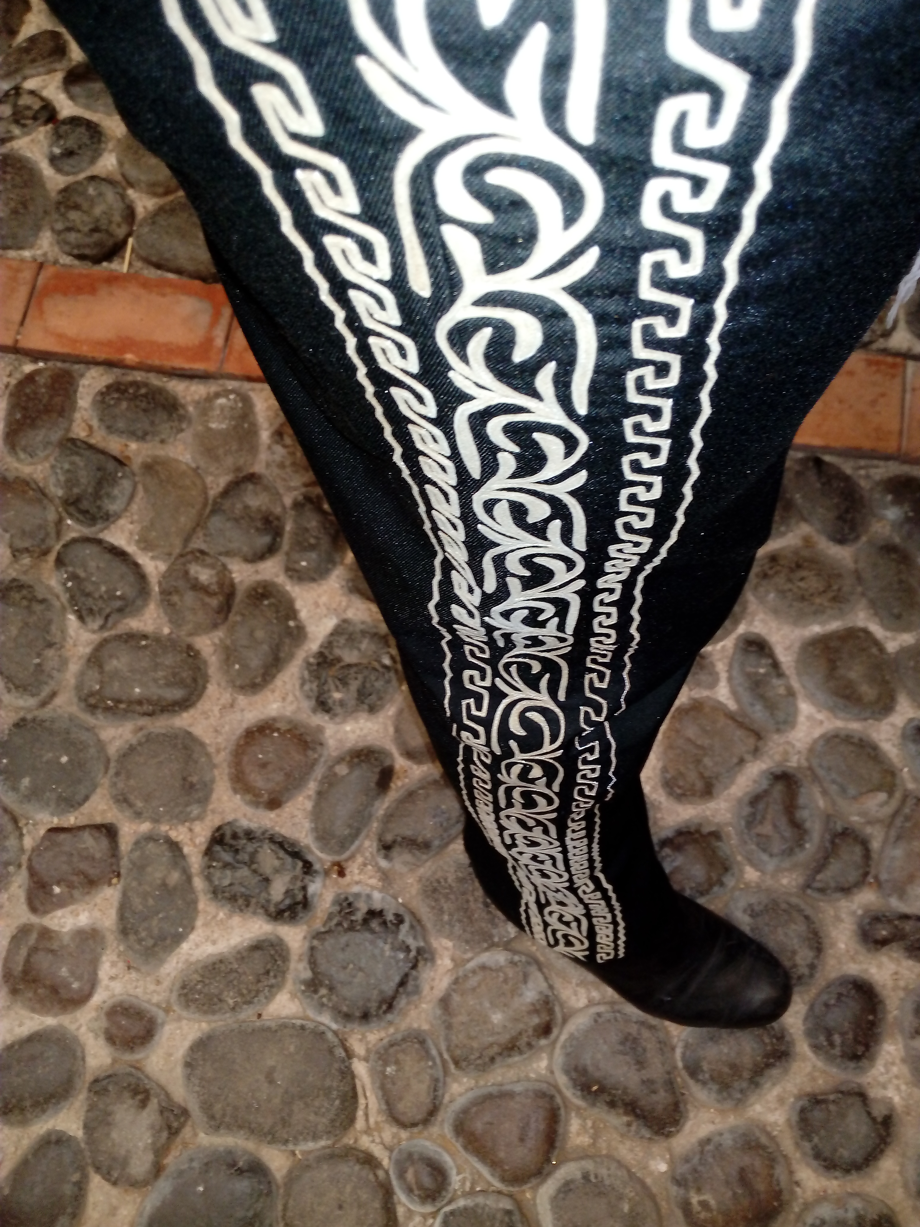 Detalle de las grecas de un pantalón de charro.